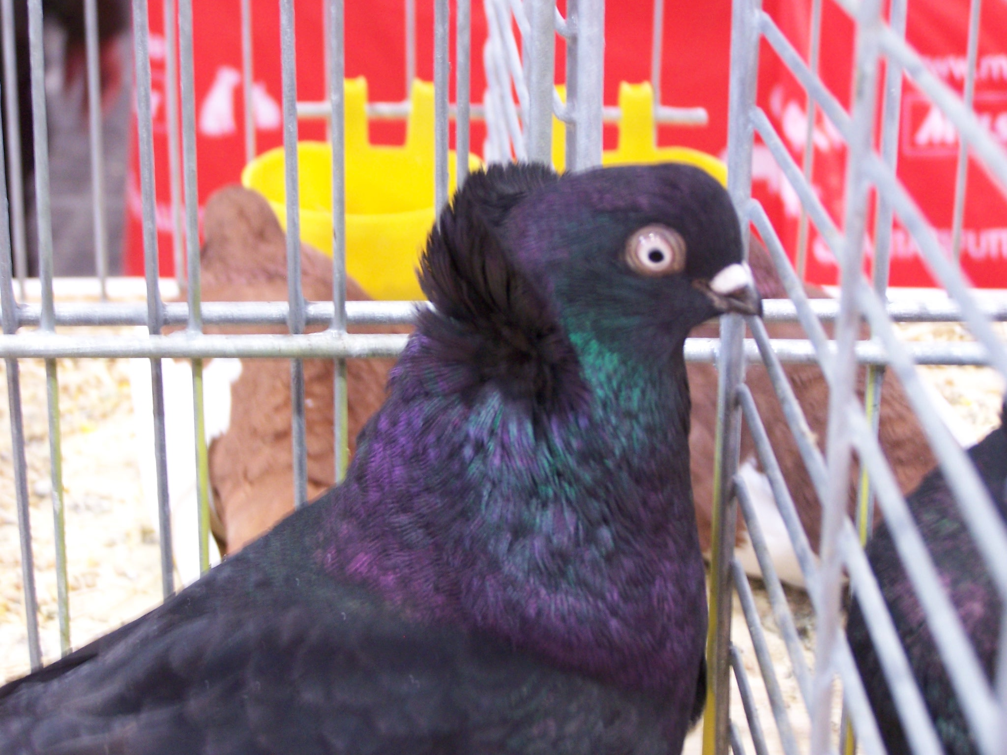 fely eenk zwart